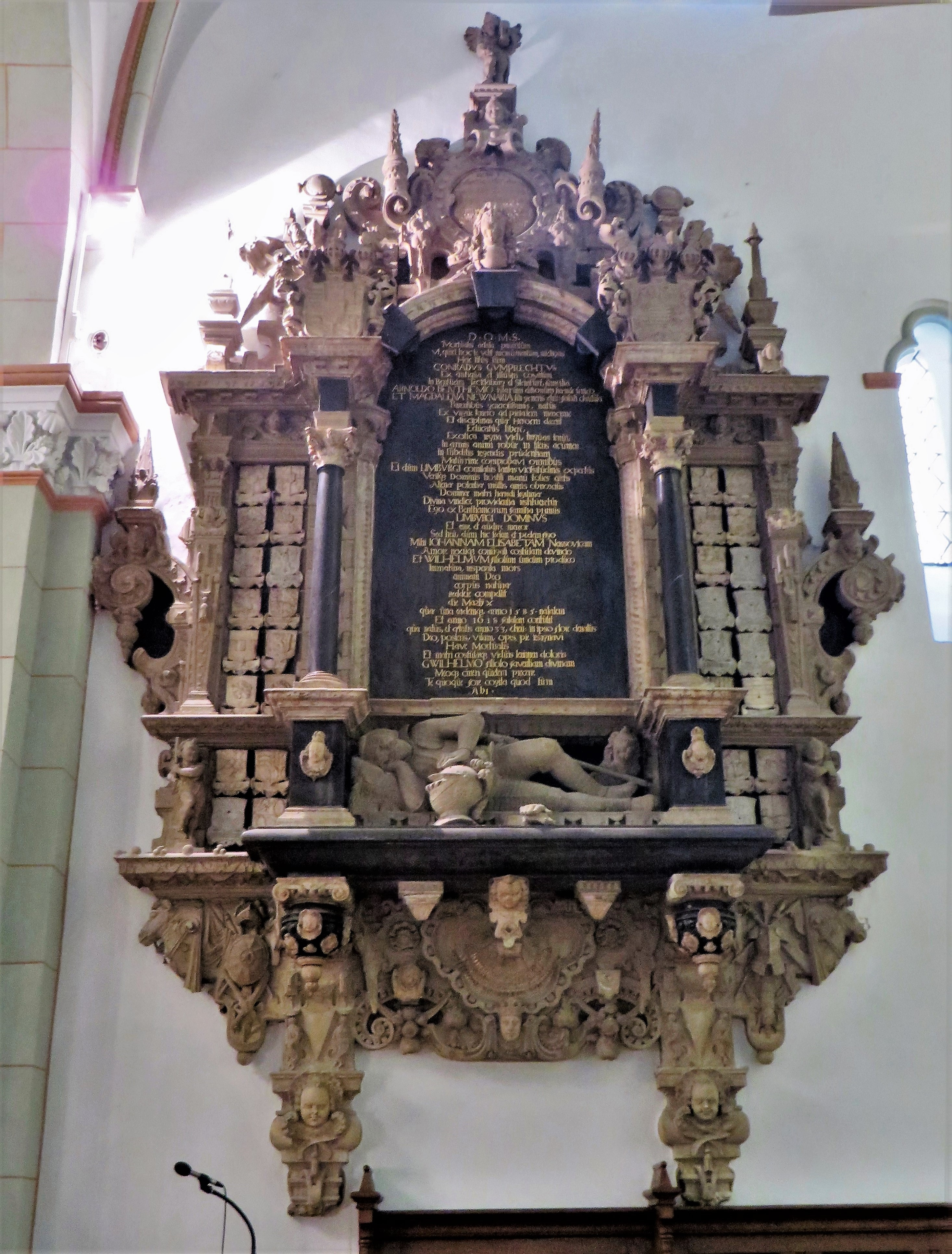 Evangelische Kirche Elsey in Hohenlimburg, Elseyer Kirchplatz. An der linken Seite des Chorraumes befindet sich das Gumprecht-Epitaph. Es zeigt eine Gestalt, die Graf Konrad Gumprecht von Bentheim-Tecklenburg und Limburg, geb. am 10. März 1585 und gestorben am 10. März 1618, darstellen soll. Das Werk (6 x 3,5 m) aus der Übergangszeit zwischen Renaissance und Frühbarock wurde 1619 im Auftrag von Konrad Gumprechts Frau Johannetta Elisabeth, geb. Gräfin von Nassau-Dillenburg, in Münster von dem Bildhauer Johann von Bocholt († 1636) angefertigt. Die zwei großen Säulen neben der Schrifttafel bestehen aus schwarzem Carrara-Marmor, die übrigen Teile meist aus Anröchter Sandstein. Die Grablege befindet sich im Chorraum unterhalb des Epitaphs.